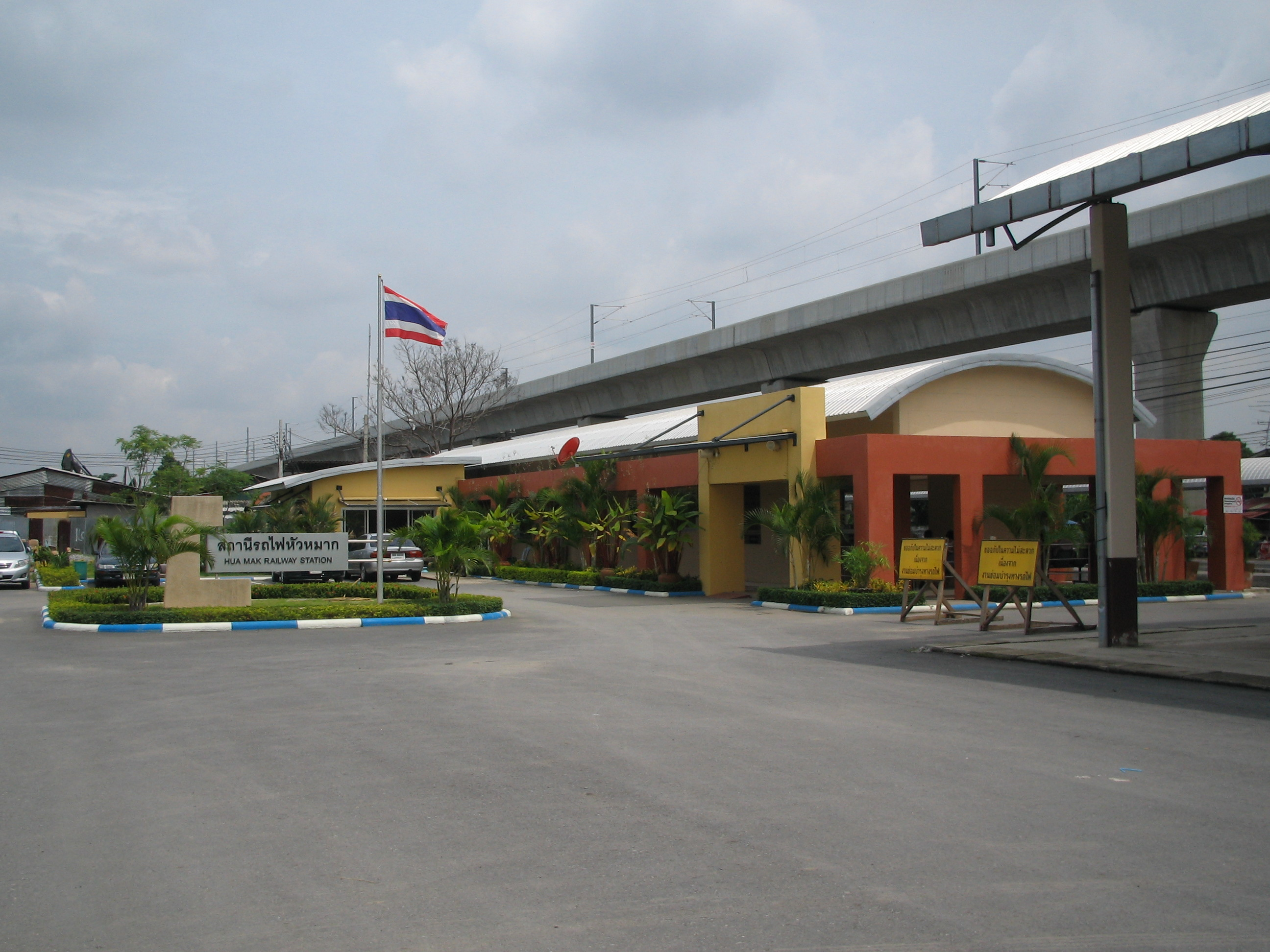 フアマーク駅